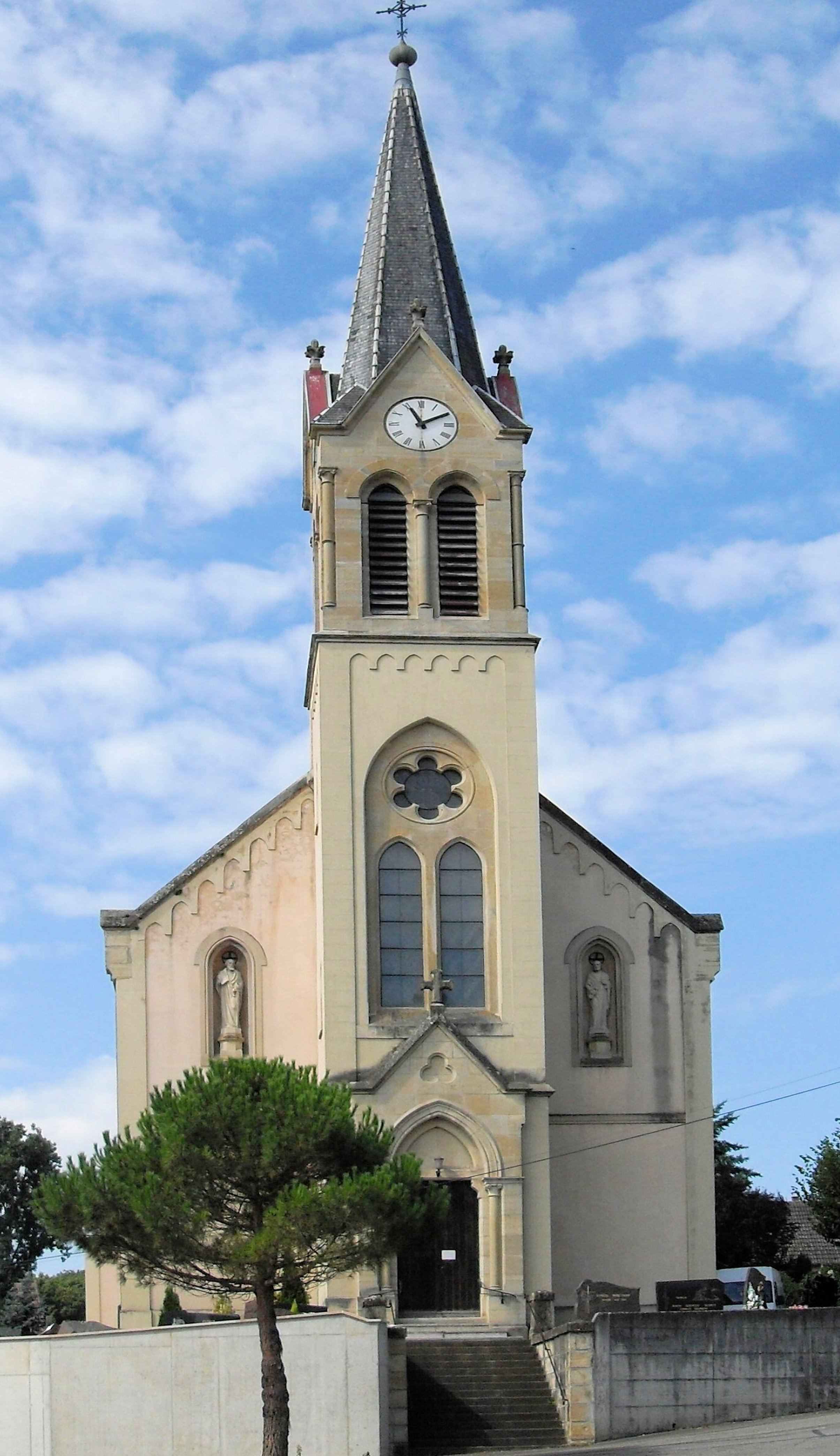 L'église Saint-Maurice à Ranspach-le-Bas